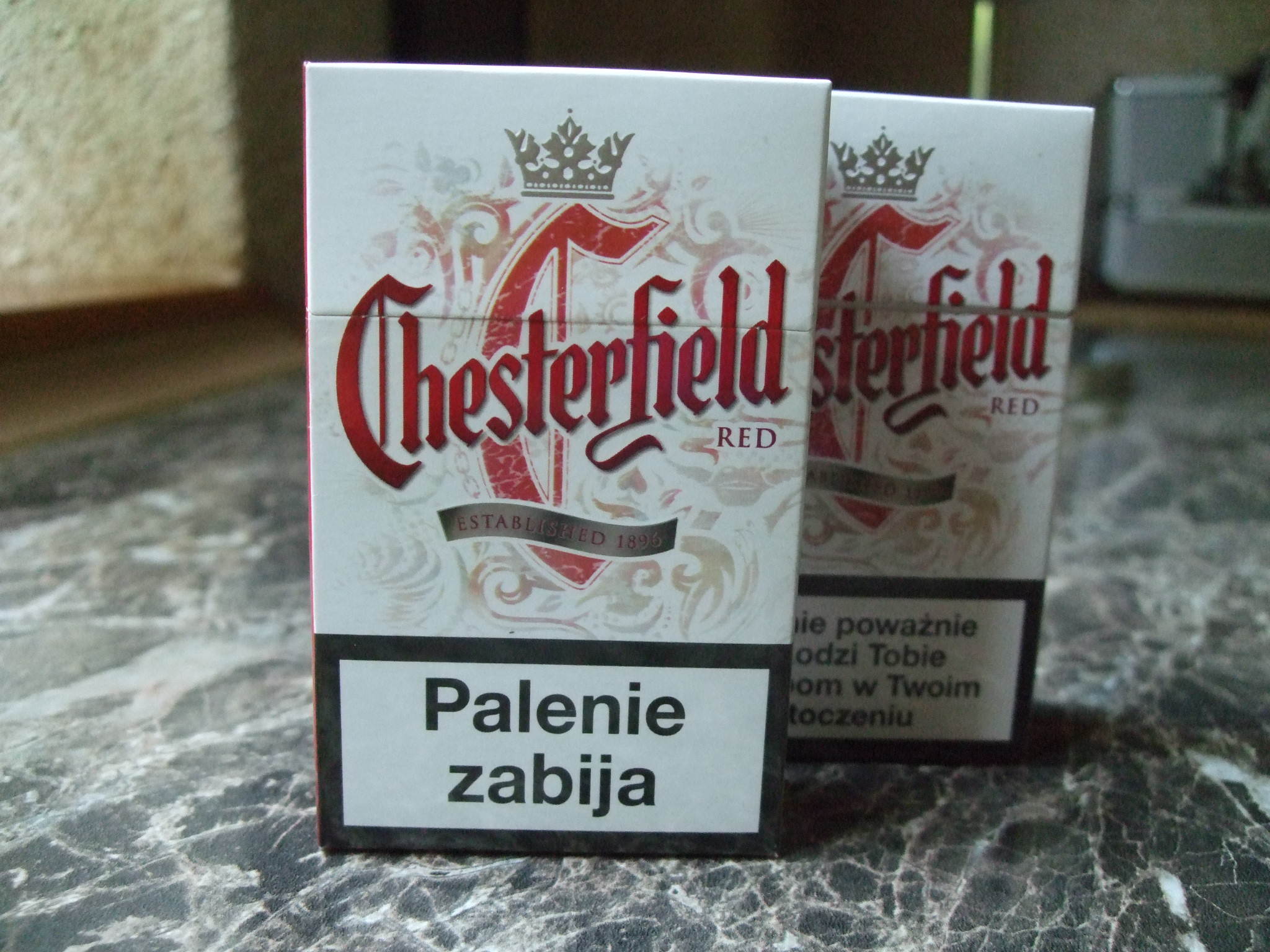 Chesterfield Red.